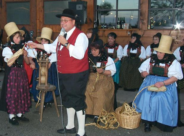 Schonacher Tracht bei einem Heimatabend 1999